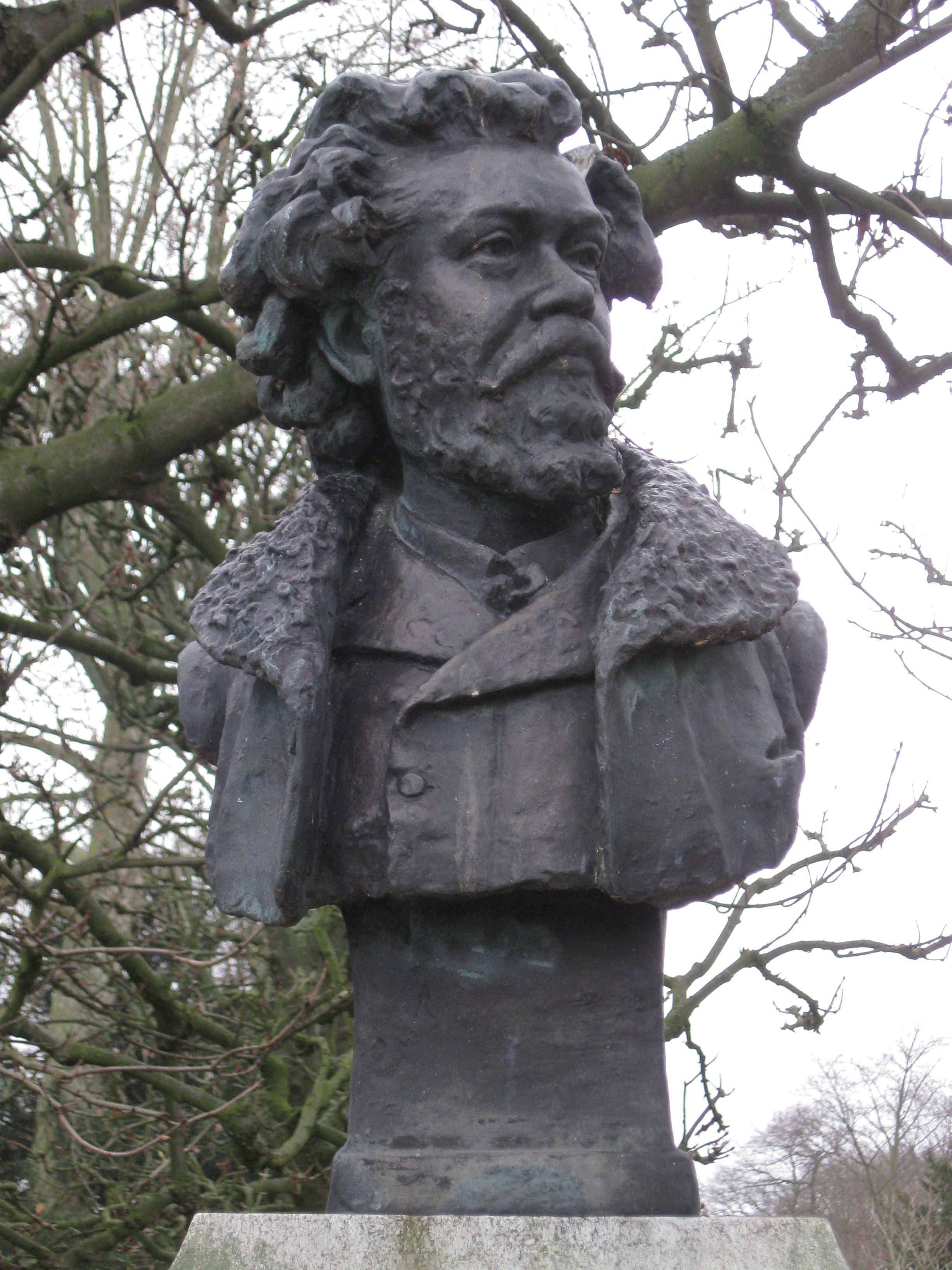 Buste de Clovis Hugues (1851-1907) dans le Jardin des Félibres, Sceaux, Hauts-de-Seine, France